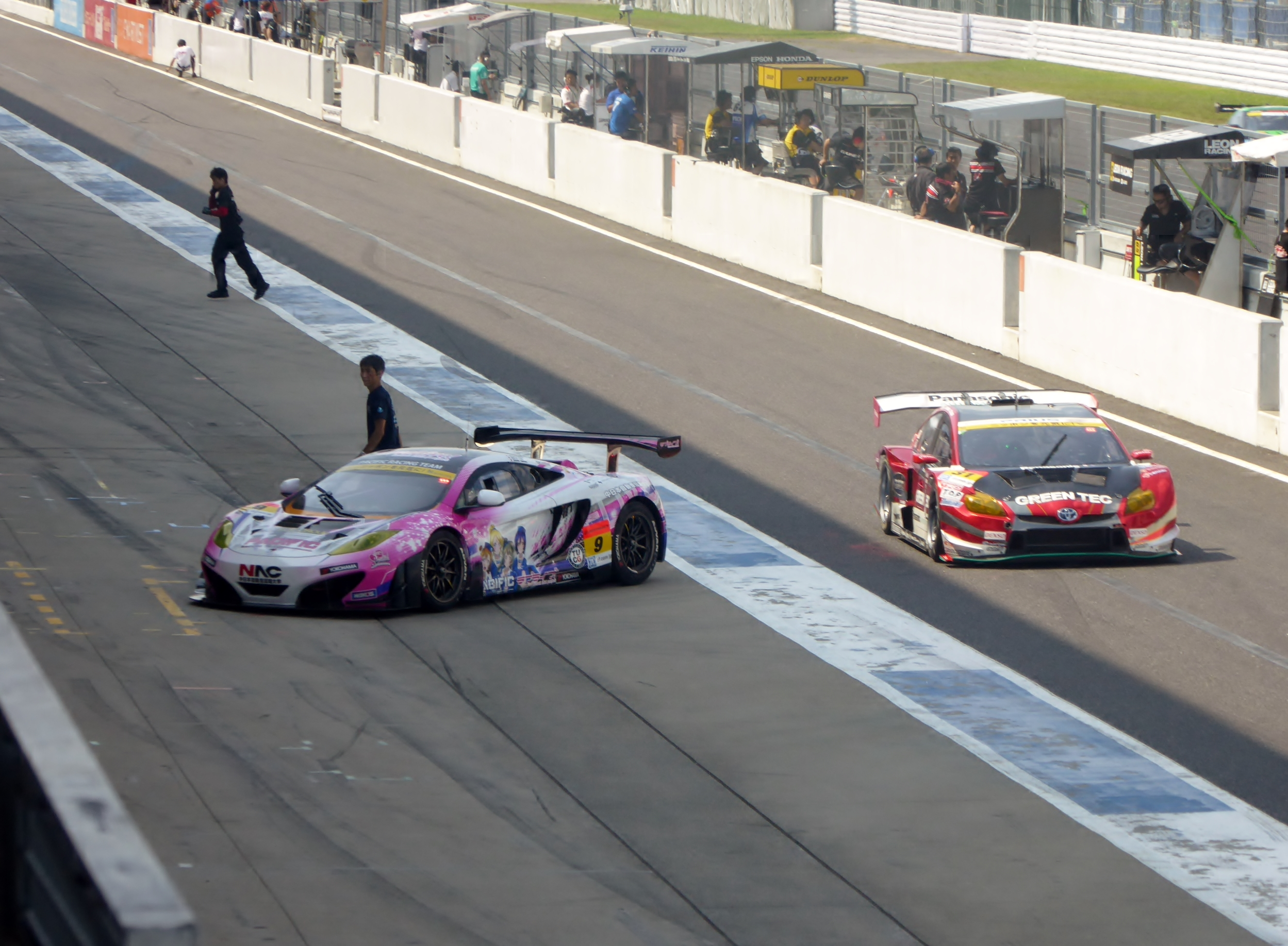 2015年度鈴鹿タイヤテストにおいての一幕を撮影。